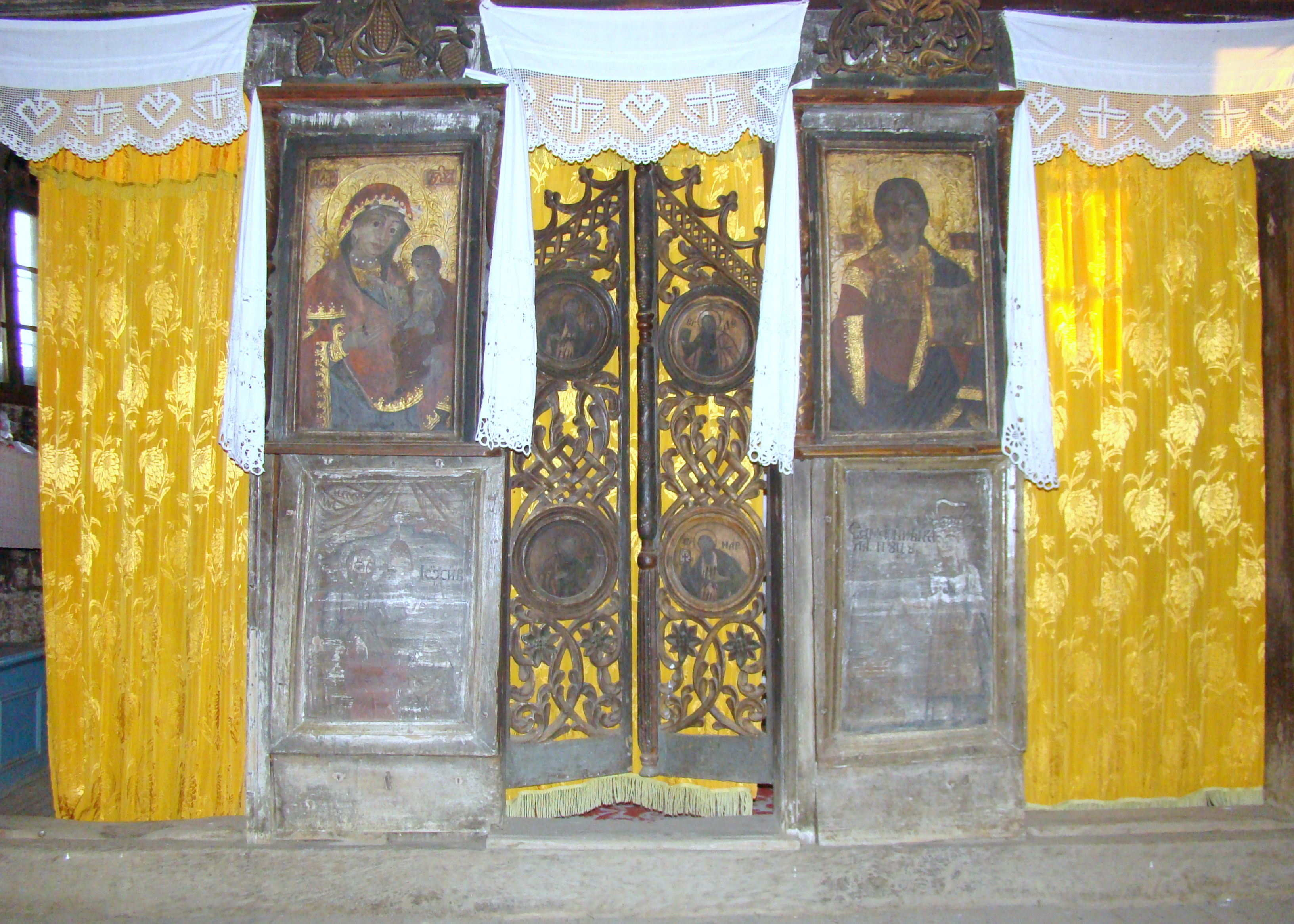 Biserica de lemn "Sfinții Arhangheli Mihail şi Gavriil" din Chieșd, județul Sălaj